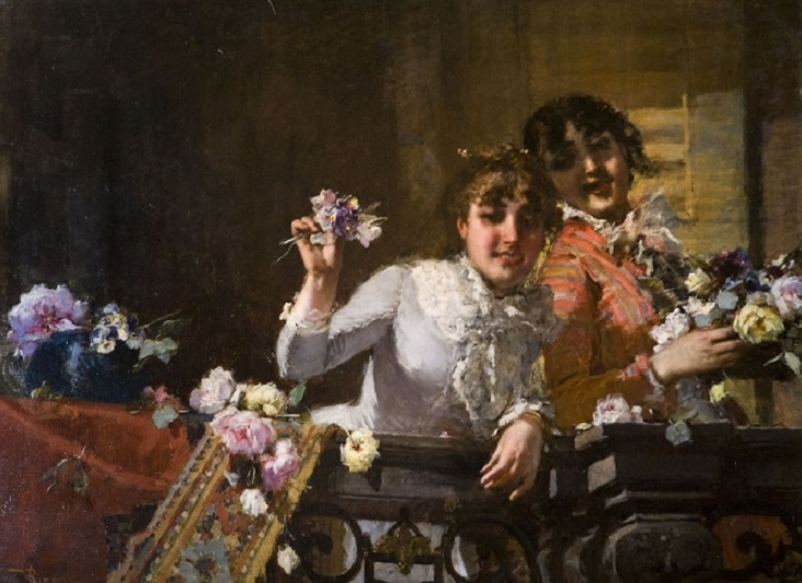 Fiori per tutti, olio su tela, 110.5 x 151 cm., firmato, coll. privata